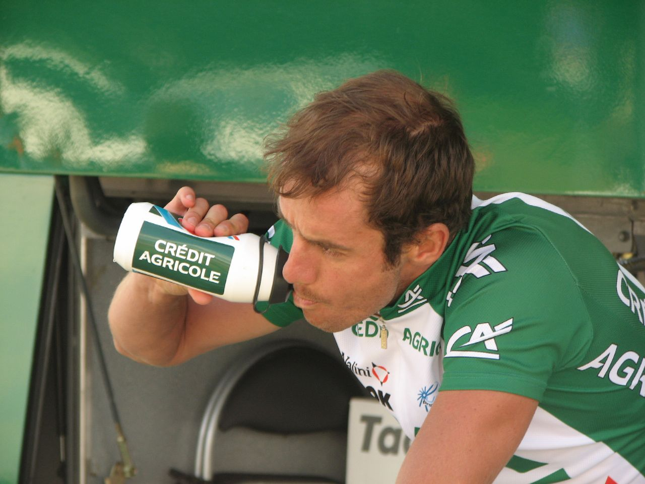 Sébastien Hinault, French cyclist